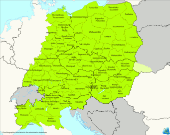 europa centrale geografica.